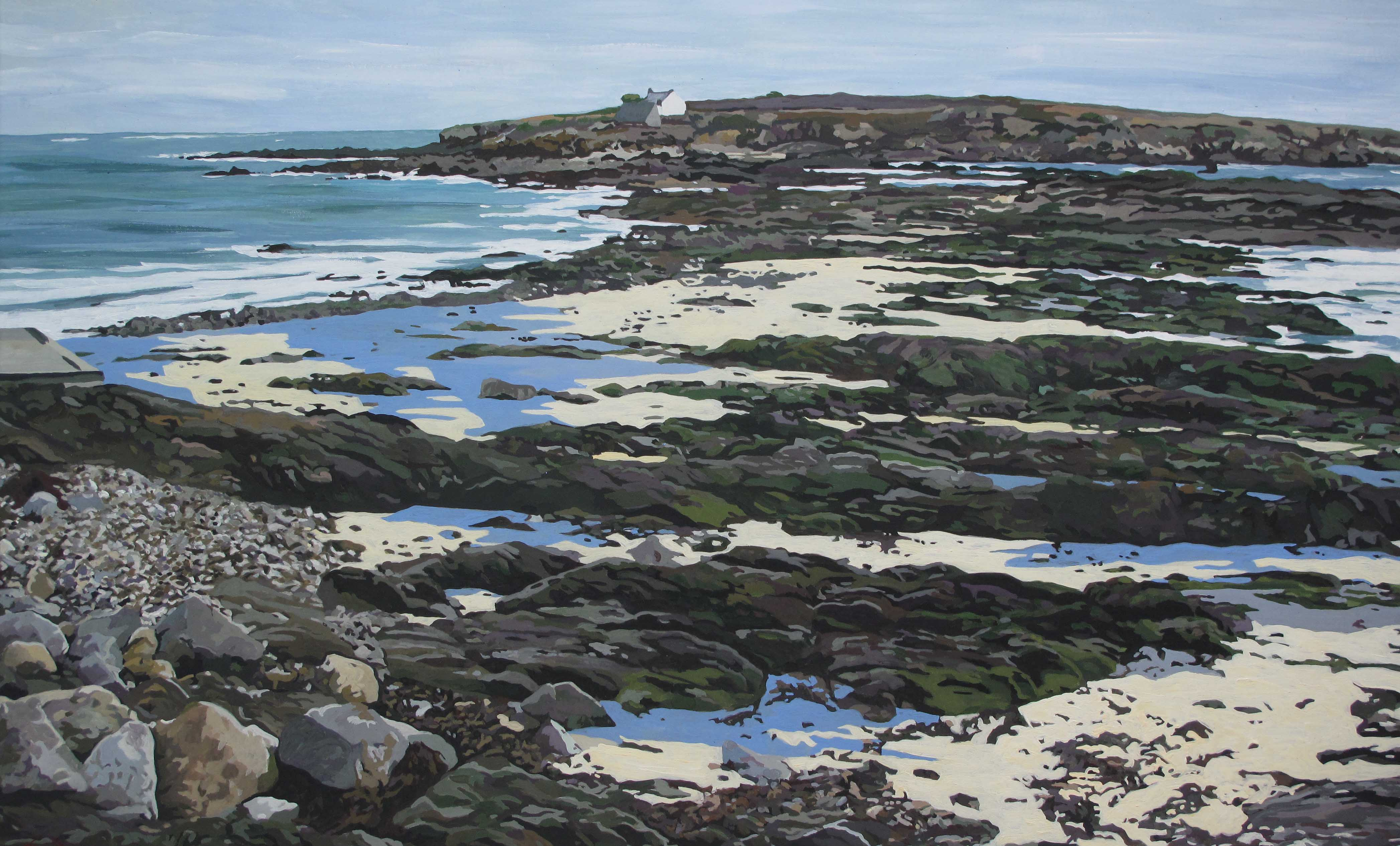 Raguénes, gouache on paper, 44 x 70 cm